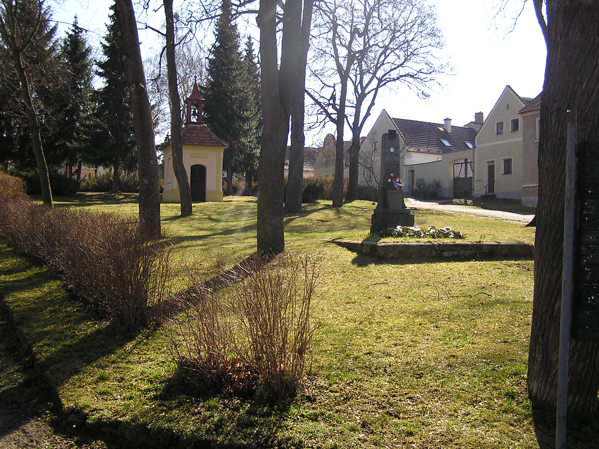 Starí Pohurka